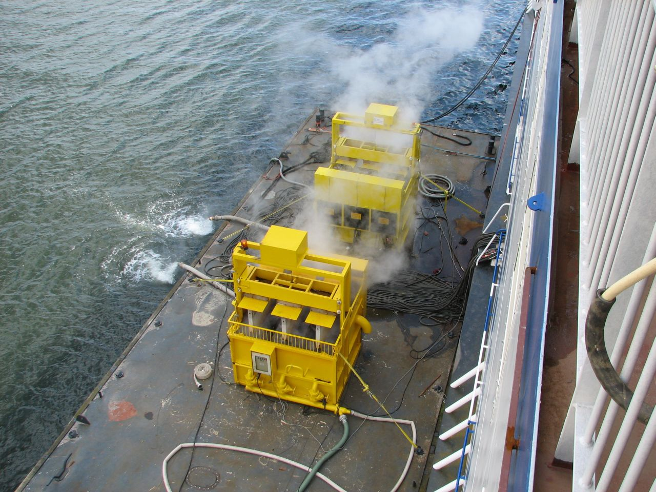 Wasserwiderstände zur Prüfung der Generatorleistung unter Last